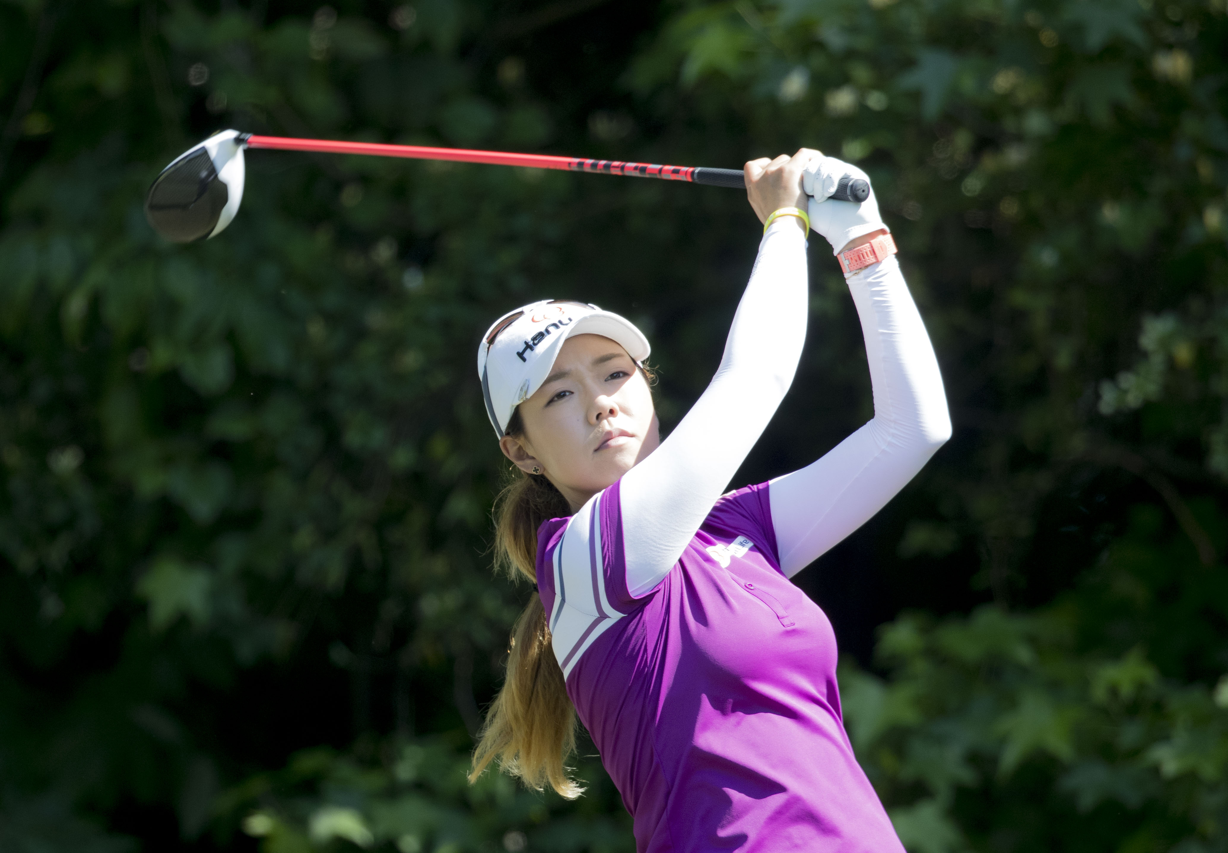 LPGA Kingsmill 2017